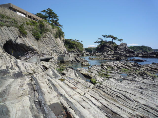 荒崎公園